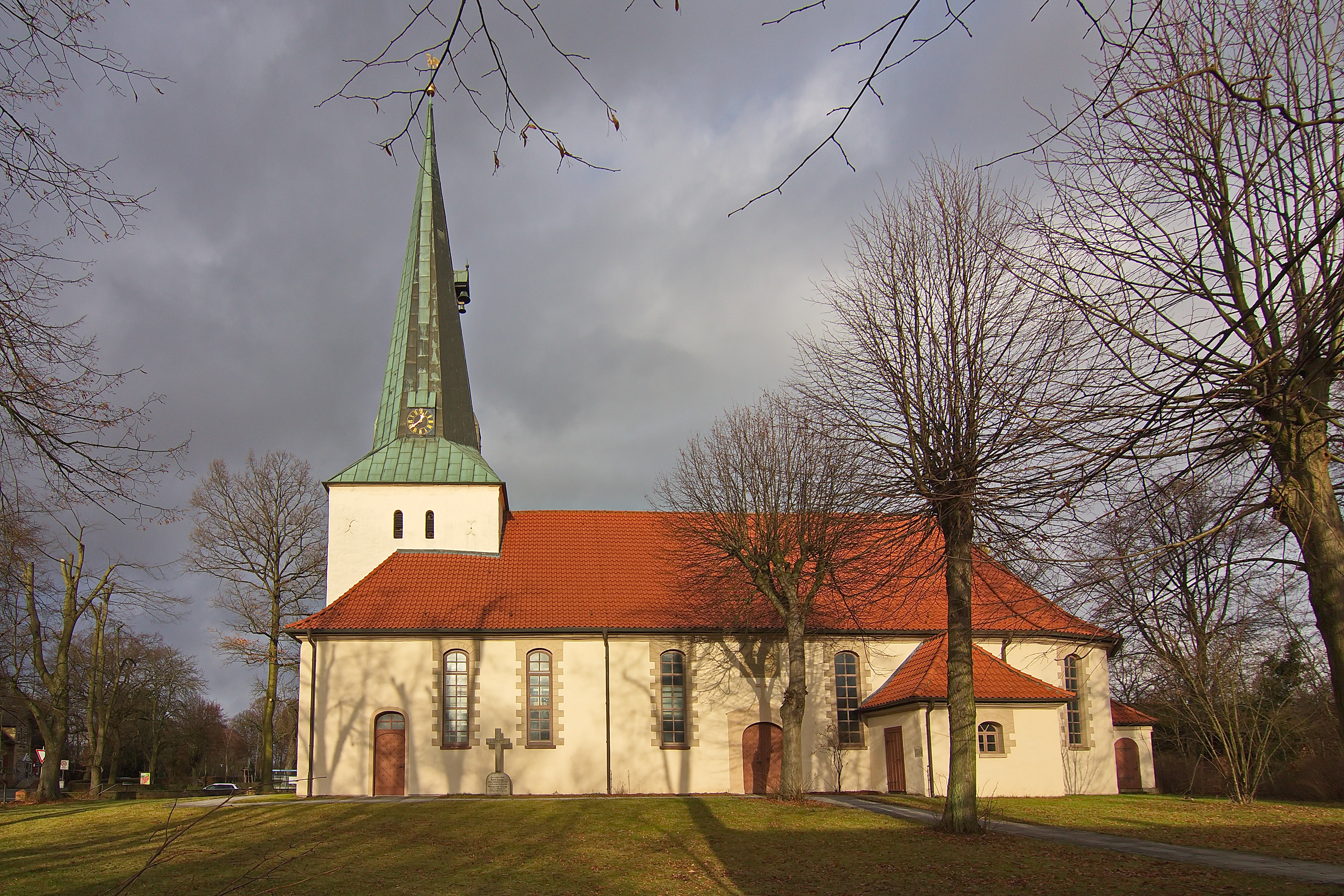 Die Martin-Luther-Kirche in Edemissen besteht aus einem Turm, der um 1200 entstand und dem 1691 errichteten Kirchenschiff.